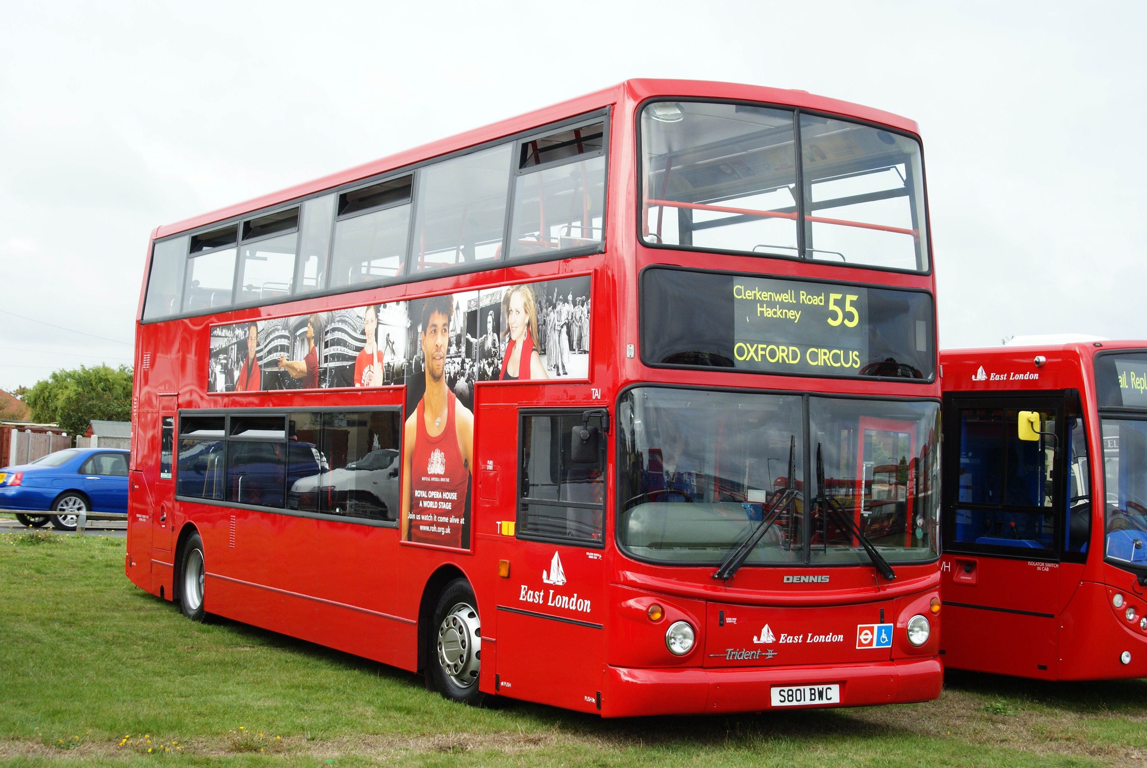 S801BWC 111009 CPS